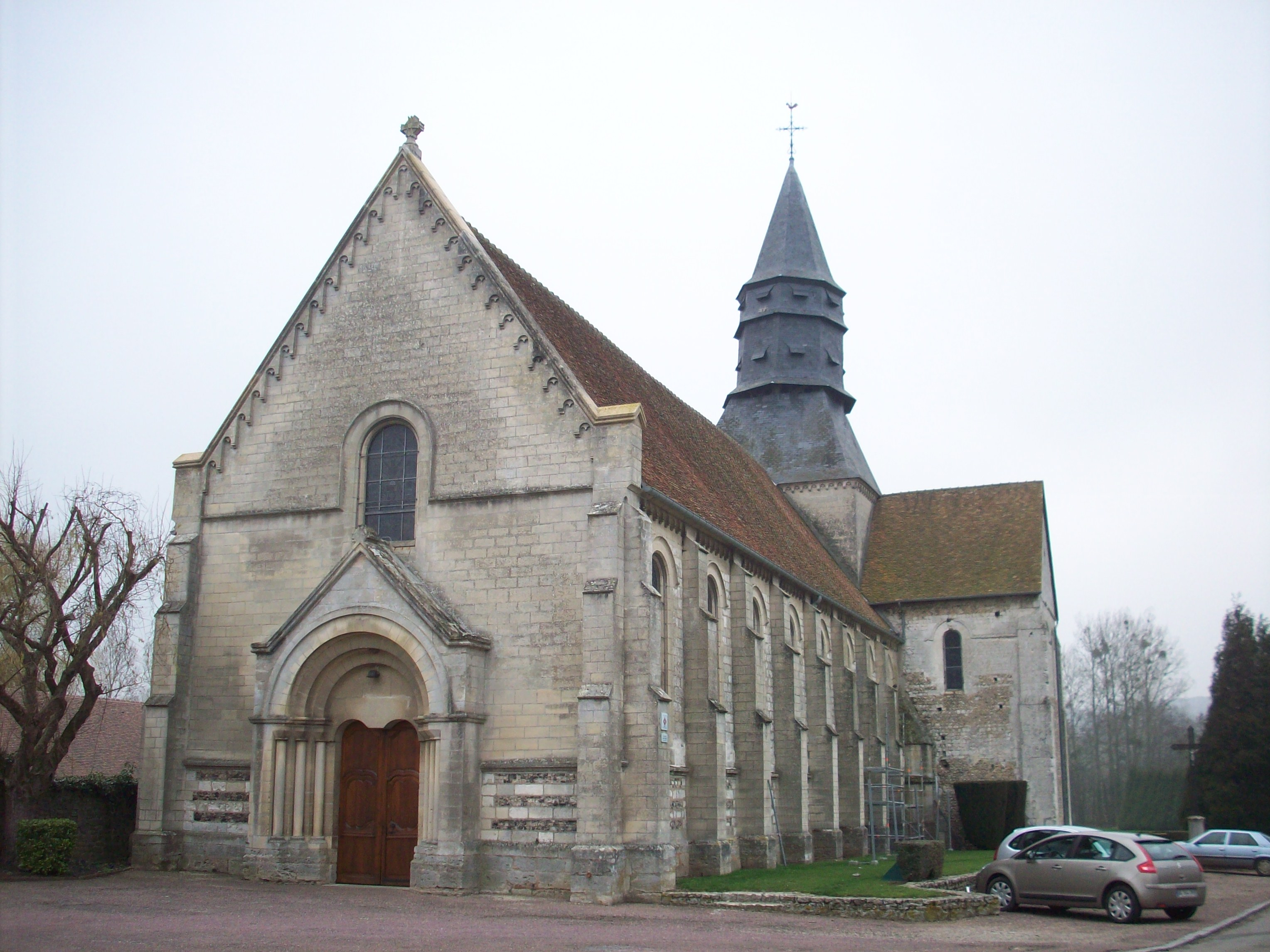 Collégiale Saint-Pierre de Neuf-Marché.